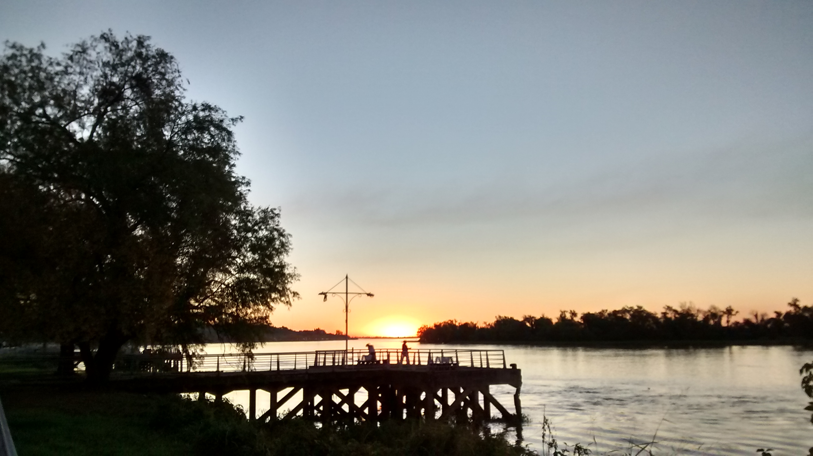 Costanera de Parana